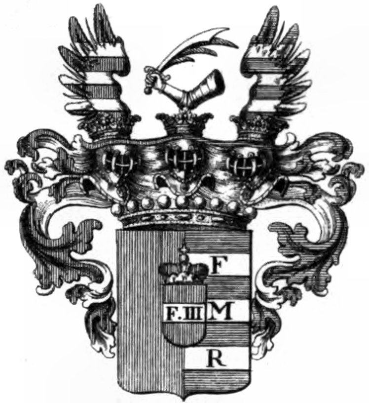 Wappen der Reichsgrafen Czernin von und zu Chudenitz 1623